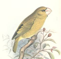 Kona Grosbeak (Chloridops kona)